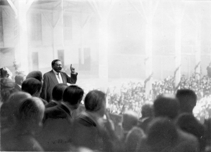 Discurso de Juan Vázquez de Mella en Santander